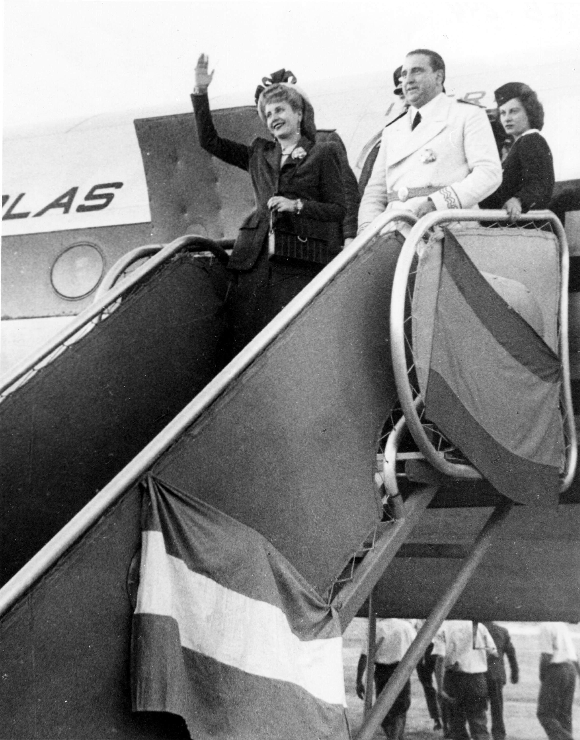 La esposa del presidente de Argentina, Eva Duarte de Perón, a su llegada a España en 1947.